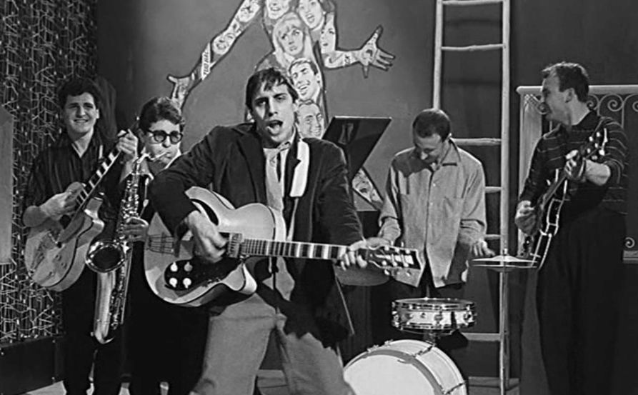 I Ribelli nel 1961 con Adriano Celentano (Screenshots dal film Io bacio... tu baci)